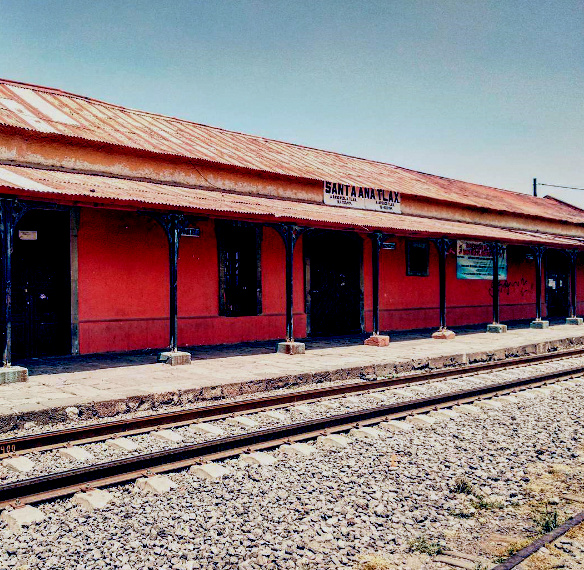 Estación de tren de Santa Ana Chiautempan, Tlaxcala, México